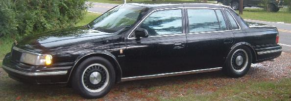 1989 Lincoln Continental Signature Series